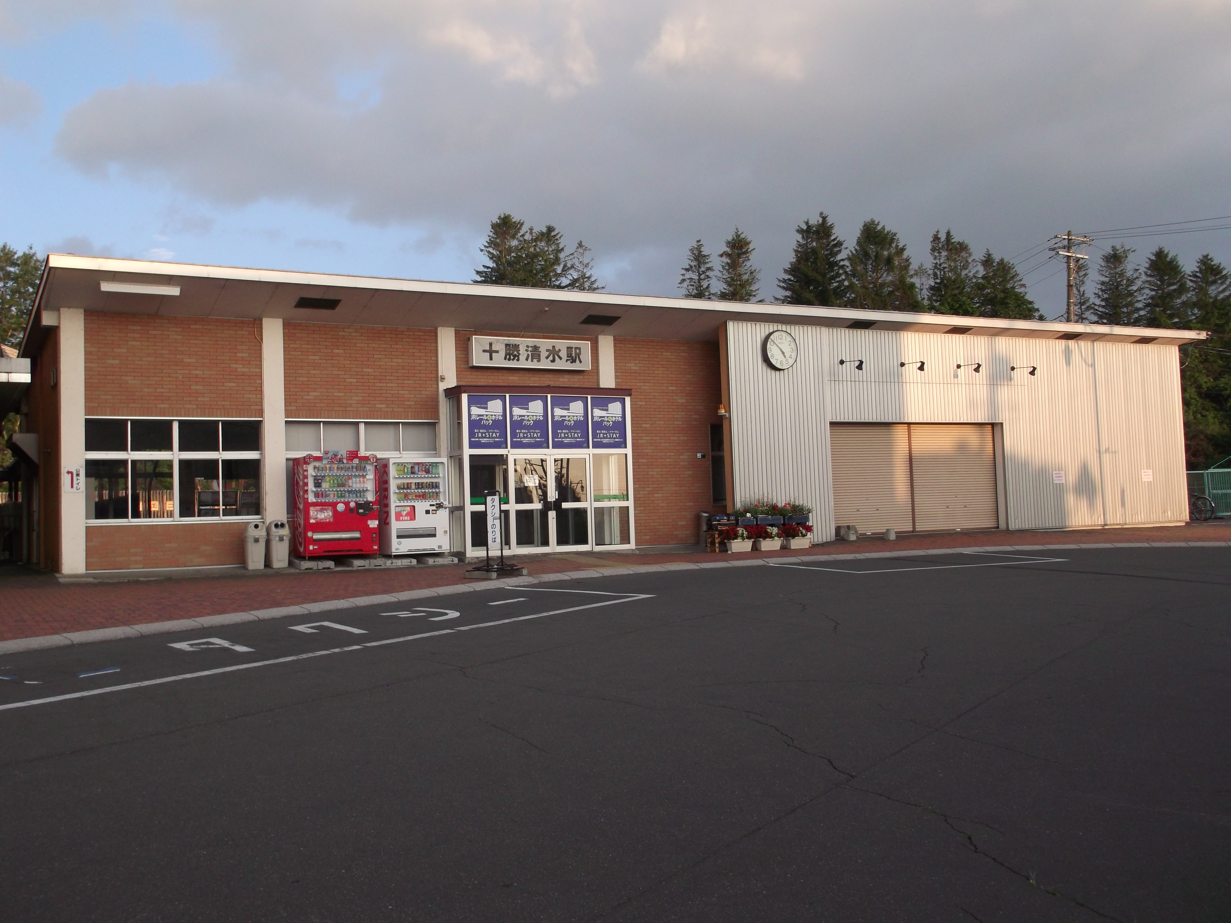 JR北海道根室本線十勝清水駅 駅舎